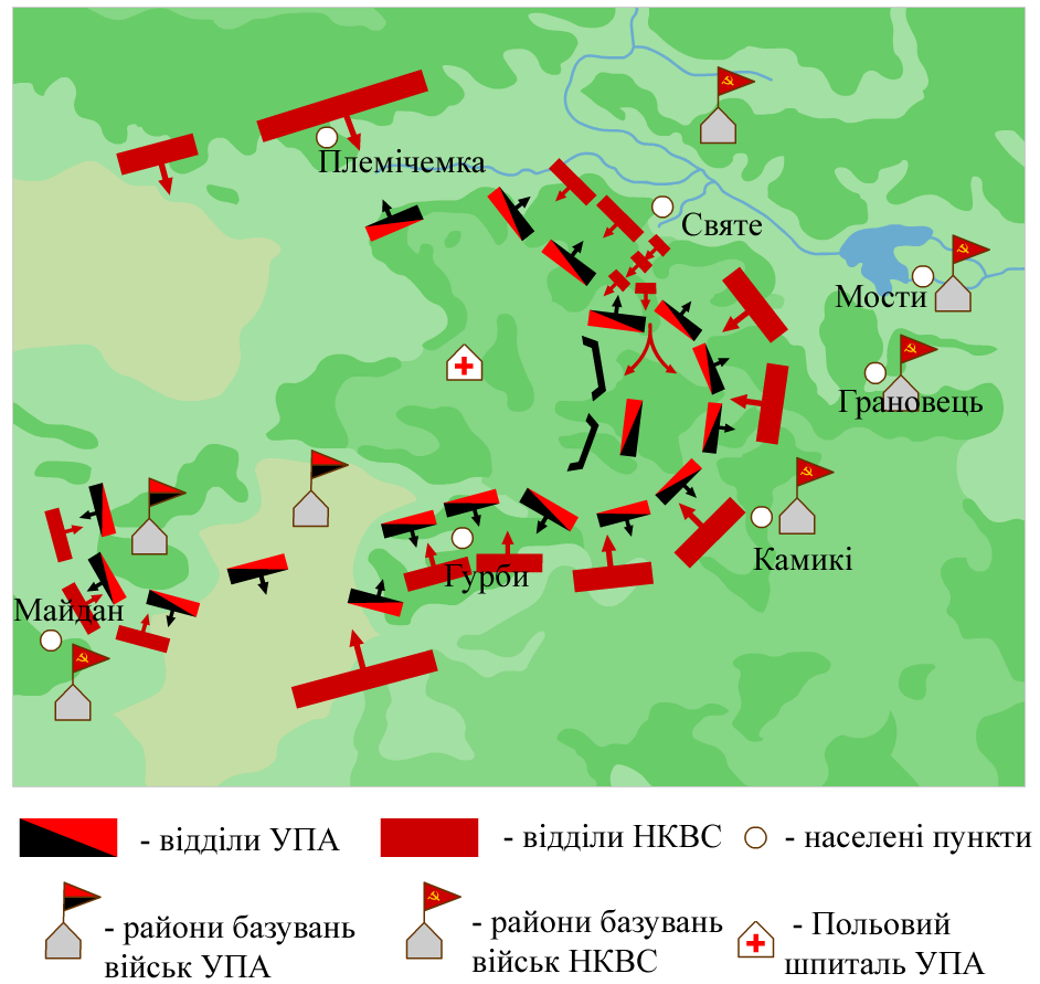 Битва при Гурбах